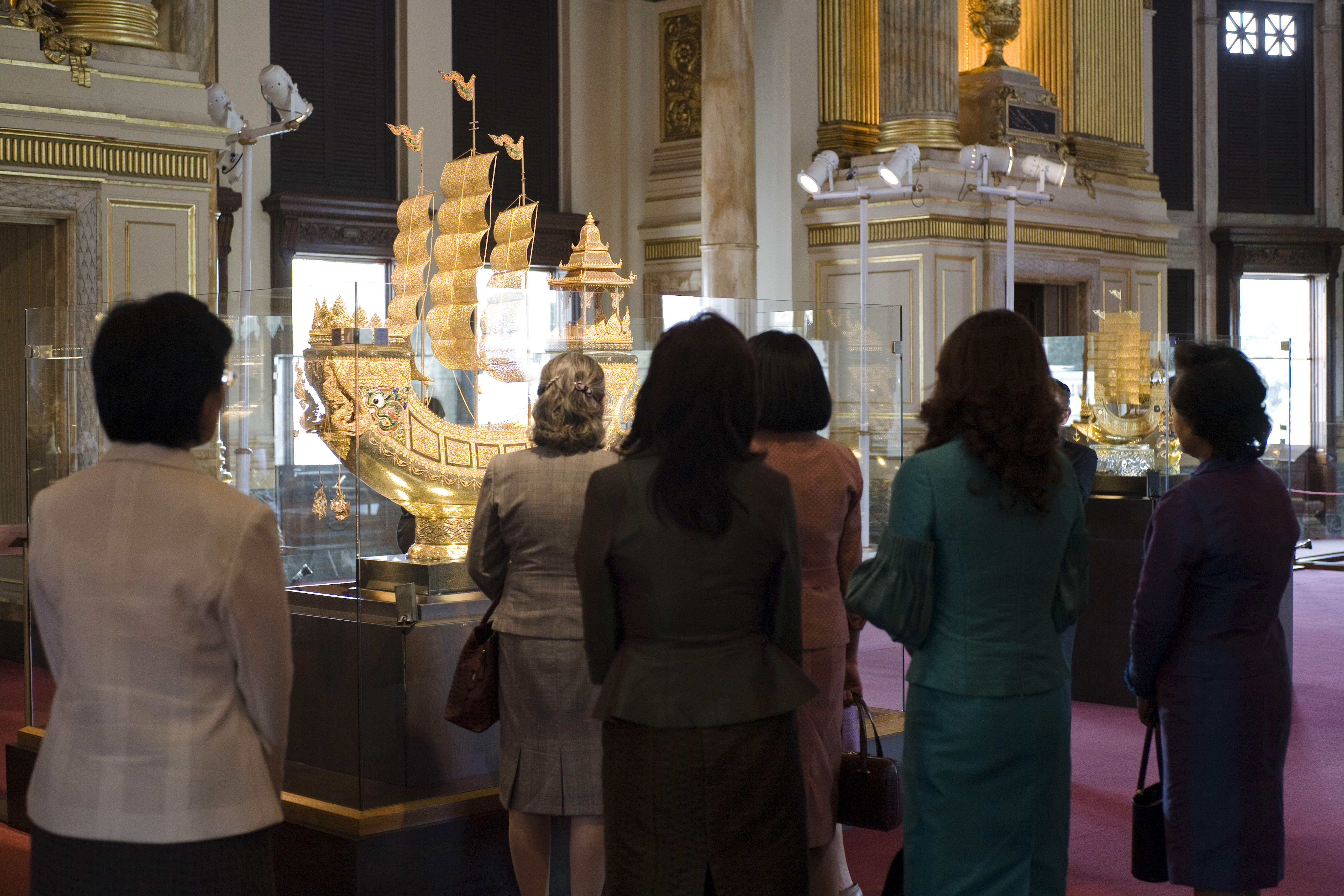 นางบัน ซุน เท็ก ภริยาเลขาธิการสหประชาชาติ พร้อมด้วย ผู้ช่วยศาสตราจารย์ พิมพ์เพ็ญ เวชชาชีวะ ภริยานายกรัฐมนตรี และนางจินตนา ภิรมย์ ภริยารัฐมนตรีว่าการกระทรวงการต่างประเทศ เยี่ยมชมงานศิลป์แห่งแผ่นดินครั้งที่ ๕ โดยได้รับเกียรติจากท่านผู้หญิงภรณี มหานนท์ รองราชเลขานุการในสมเด็จพระนางเจ้าฯ พระบรมราชินีนาถ และท่านผู้หญิงสุภรเพ็ญ หลวงเทพ รองราชเลขานุการในสมเด็จพระนางเจ้าฯ พระบรมราชินีนาถ ให้การต้อนรับ ณ พระที่นั่งอนันตสมาคม ถนนราชดำเนินนอก กรุงเทพมหานครฯ วันอังคาร ที่ 26 ตุลาคม พ.ศ.2553 (Photographer attached to the Prime Minister of the Kingdom of Thailand : Peerapat Wimolrungkarat / พีรพัฒน์ วิมลรังครัตน์) @is50mm